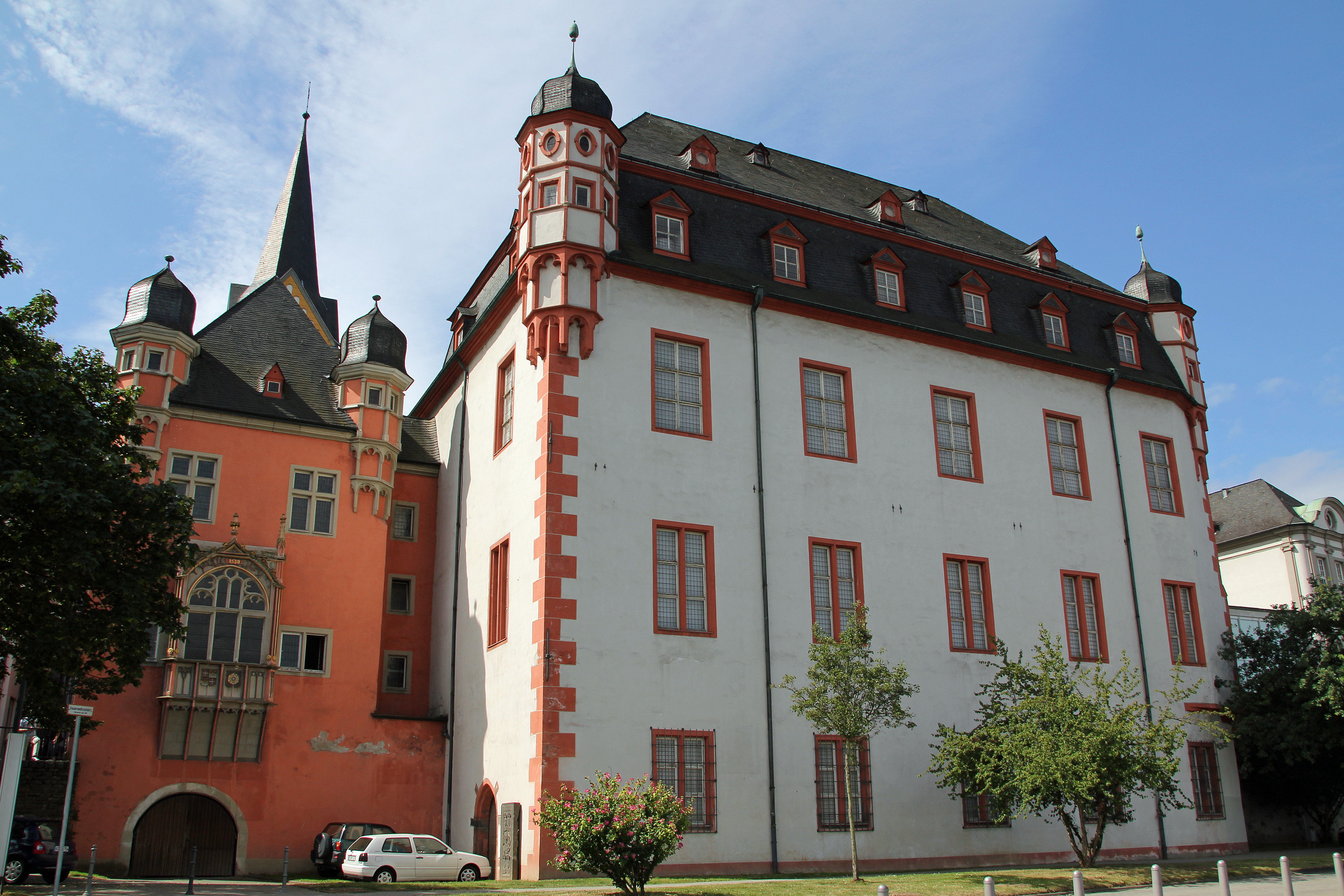 Koblenz im Buga-Jahr 2011 - Die Moselseite des Alten Kaufhauses